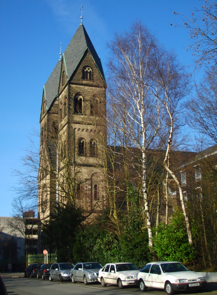 St. Suitbertus in Wuppertal, Westteil mit Türmen